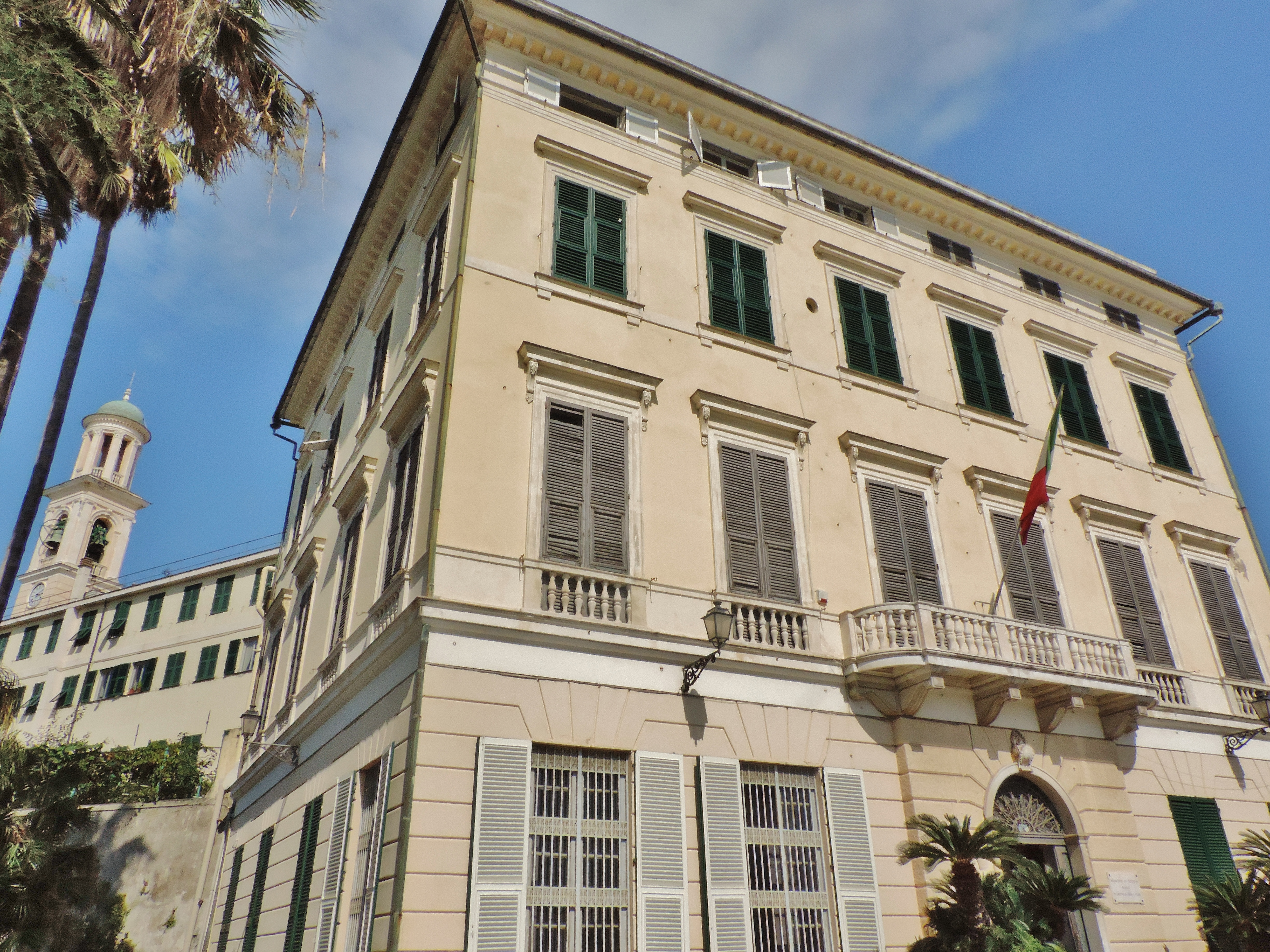 Facciata della Villa Pallavicini, sede del museo di archeologia ligure This is a photo of a monument which is part of cultural heritage of Italy.